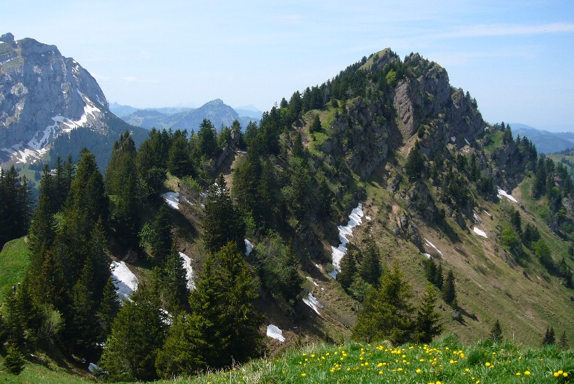 Planggenstock von Osten, Hirzli, aus gesehen